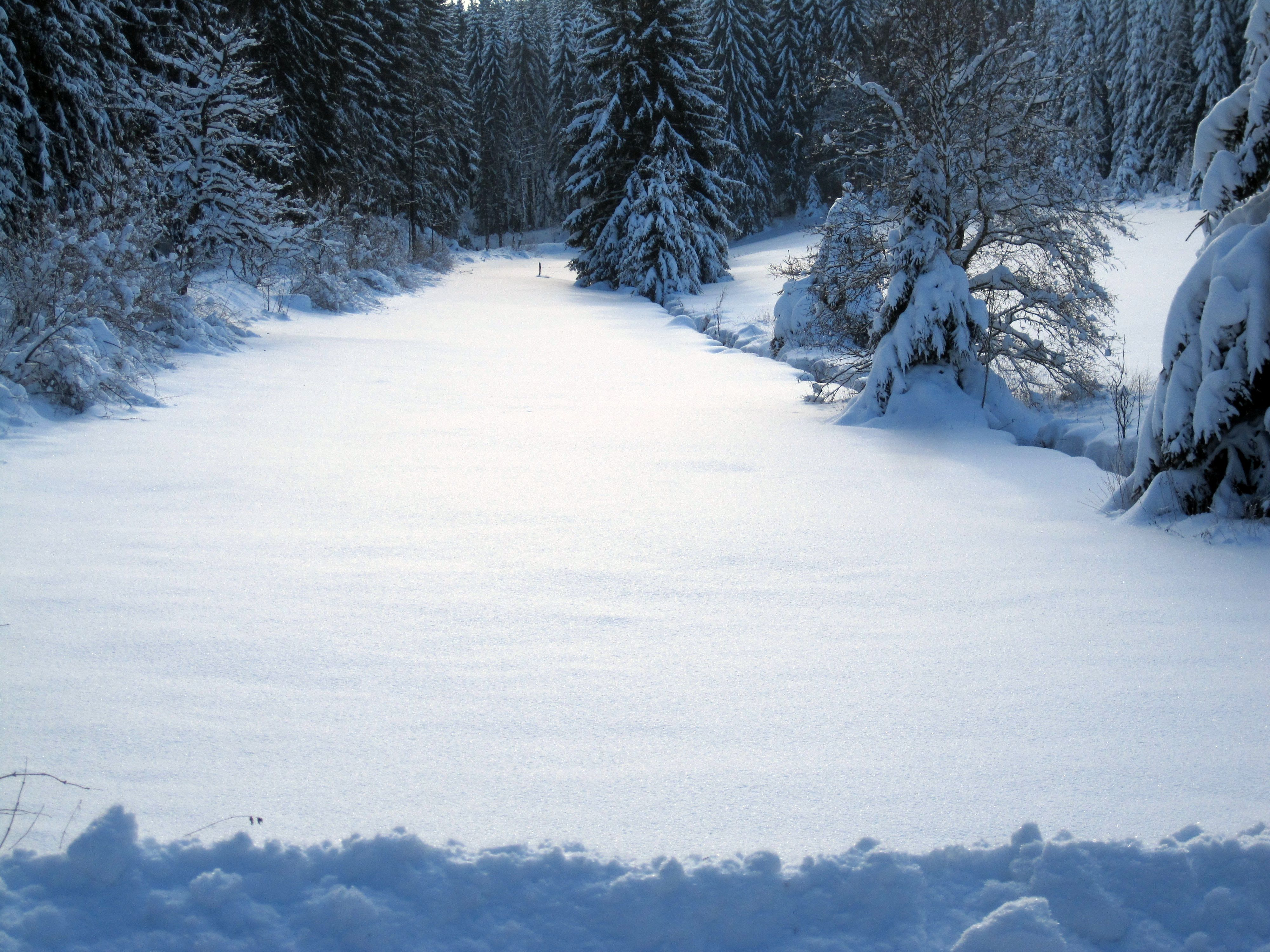 Das Wiesental im Unterlauf des Tannenbachs auf Schönheider Gebiet. Hier ist der Tannenbach schon ein Forellengewässer.